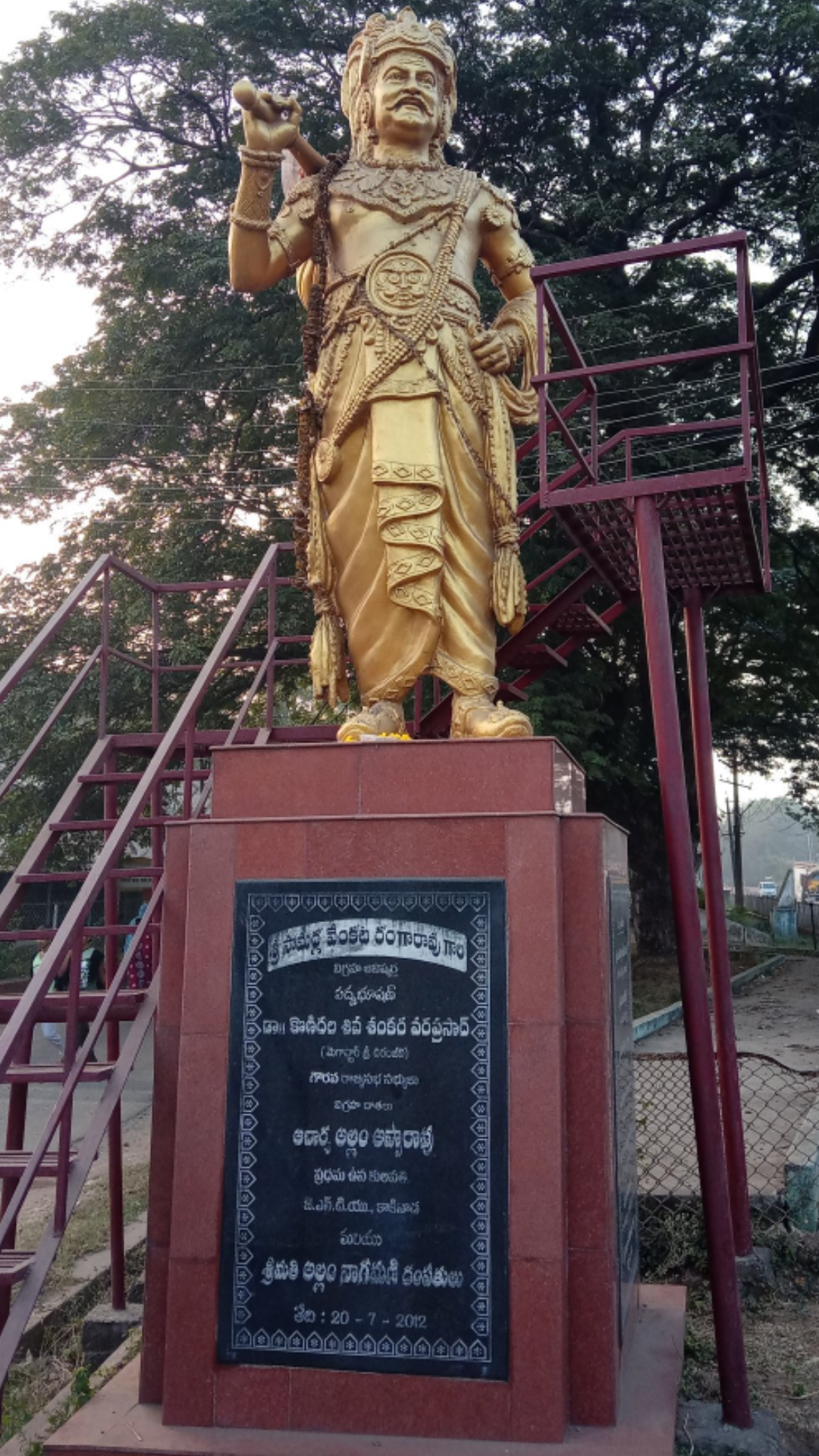 As Ghatothkacha in "Mayabazar" Telugu Movie